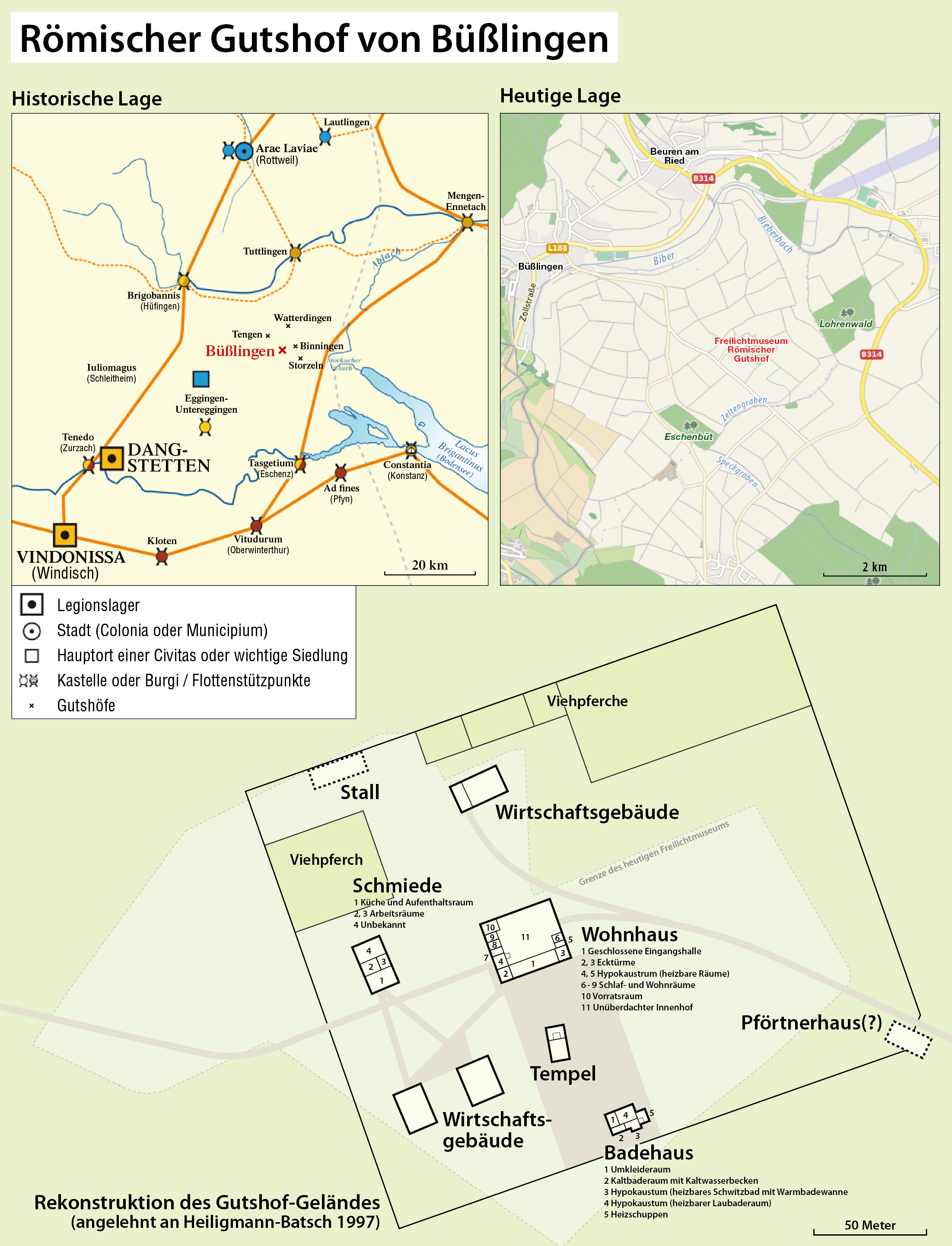 Karte des Römischen Gutshofs bei Büßlingen